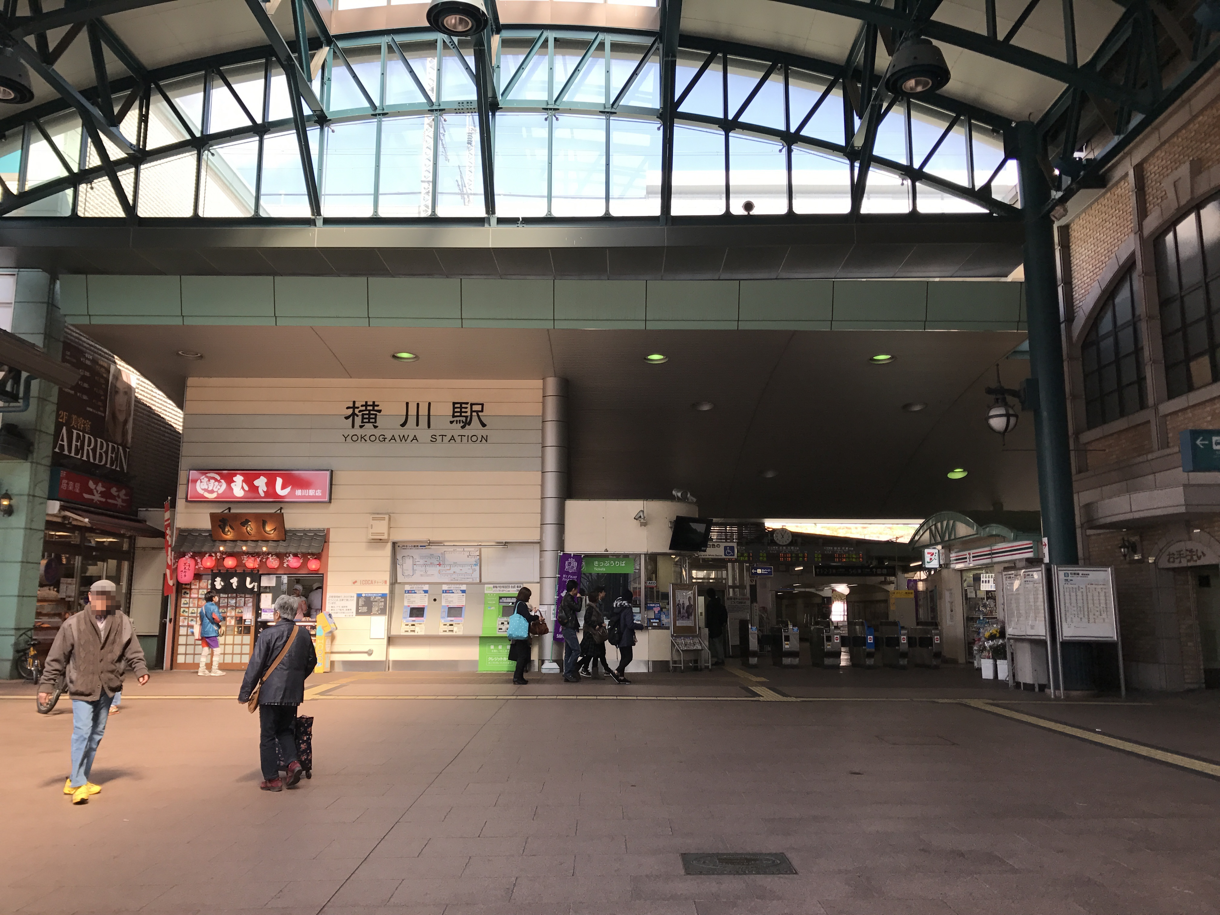 横川駅(広島県)の駅ビル